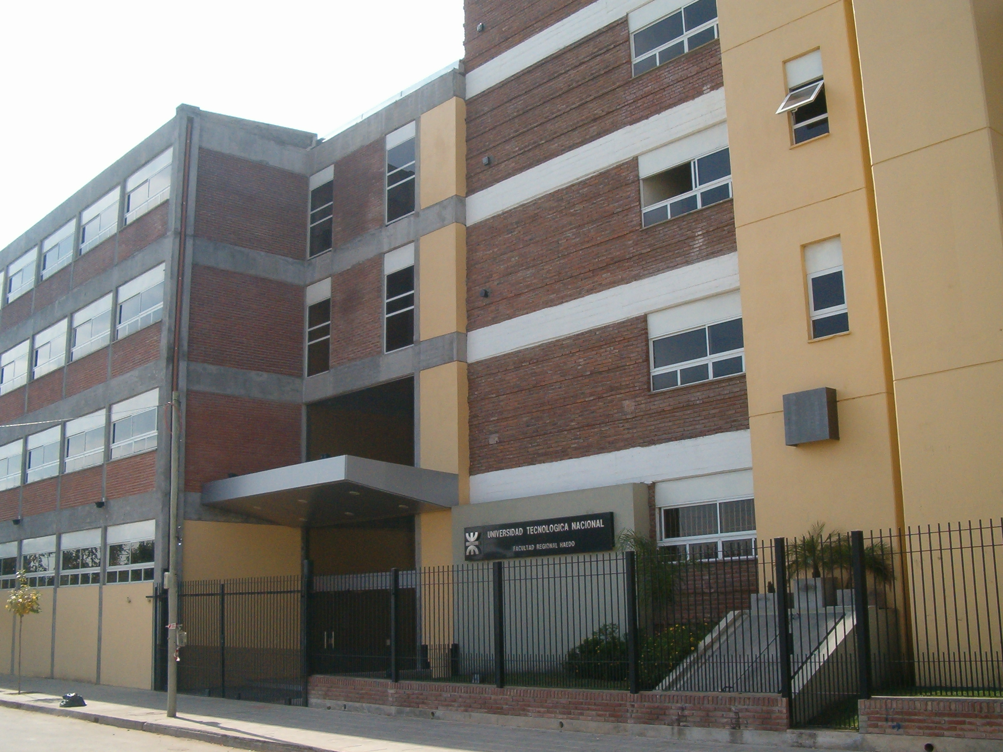 Nueva entrada principal de la Facultad Regional Haedo de la UTN